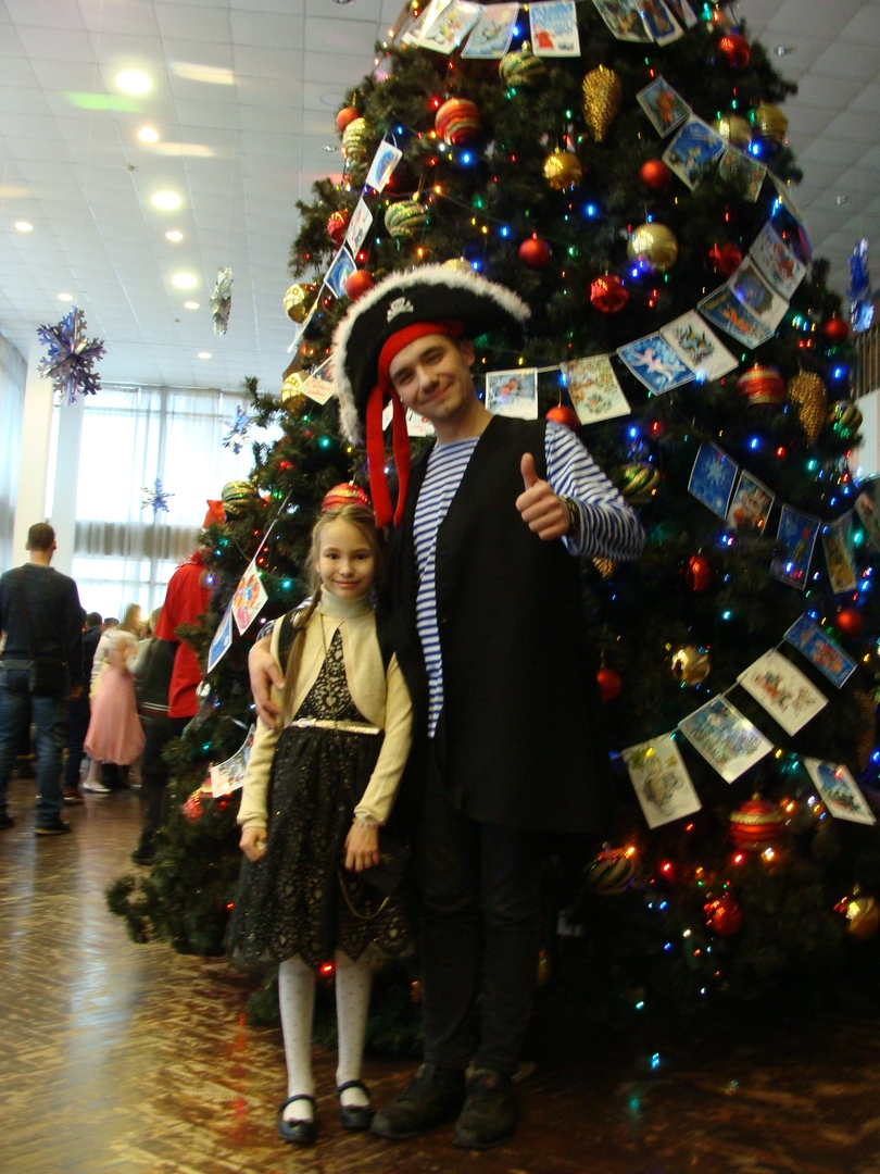 Воспитанница ДтДМ